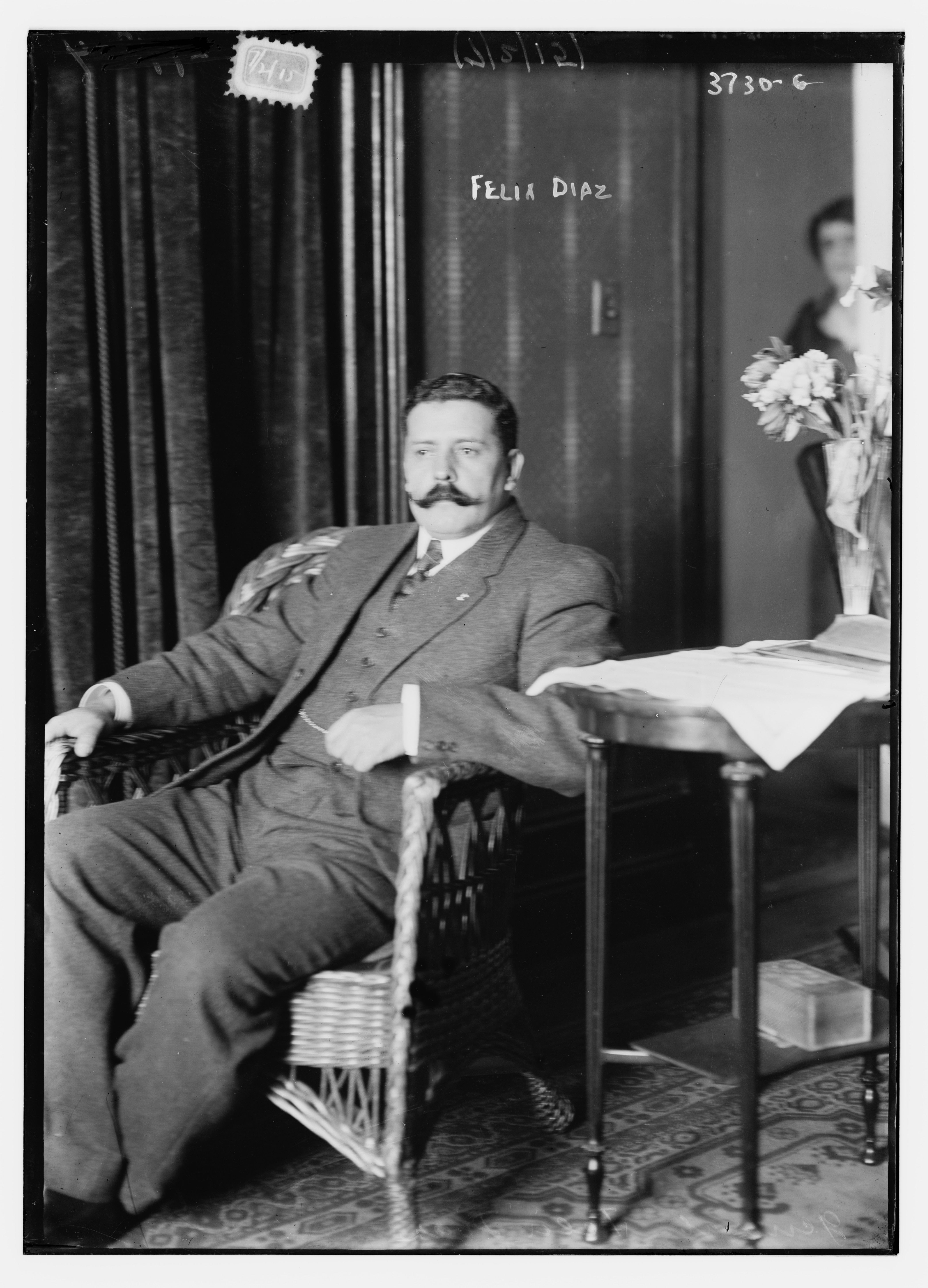 Félix Díaz militar mexicano que participó en la Revolución Mexicana.